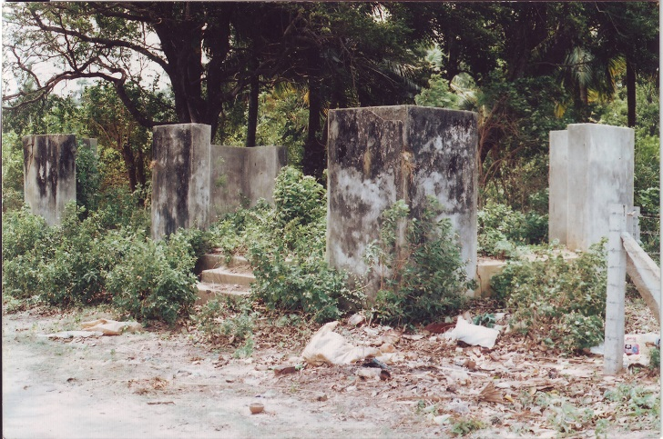 நாயன்மார் குருபூஜை மடம்